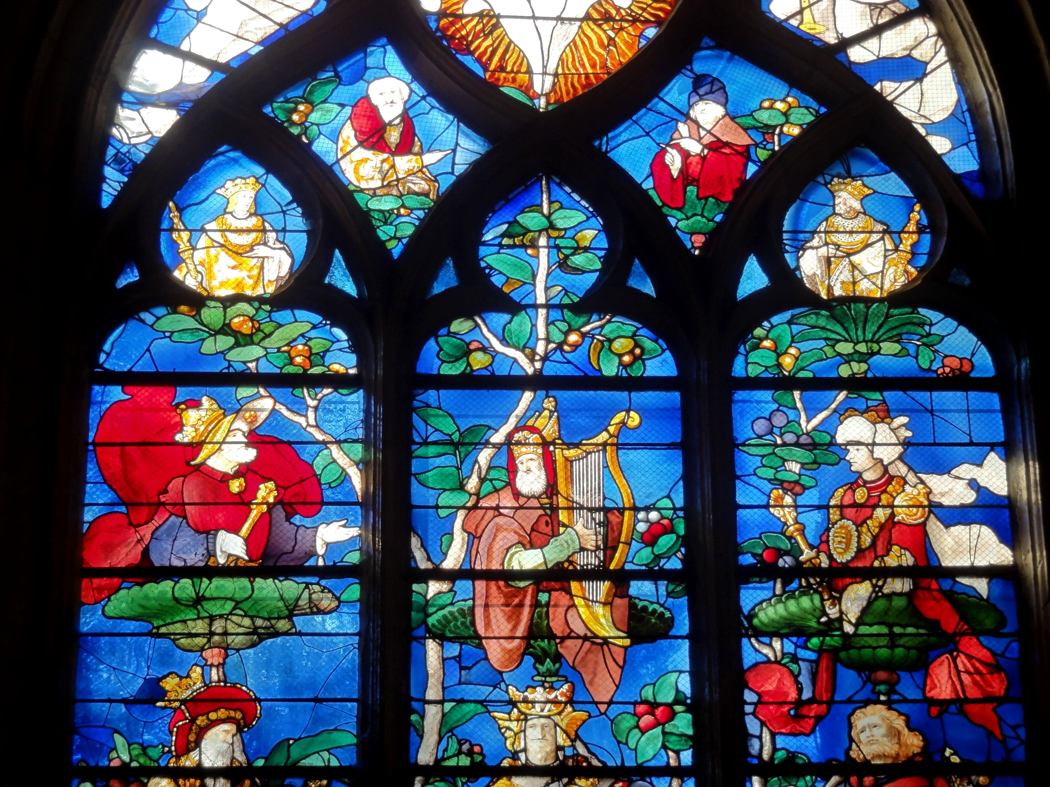 Vitrail de l'église Saint-Étienne de Beauvais, France, représentant l'arbre de Jessé.